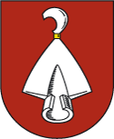 Das Wappen von Osterfingen - ehemalige Gemeinde im Kanton Schaffhausen.